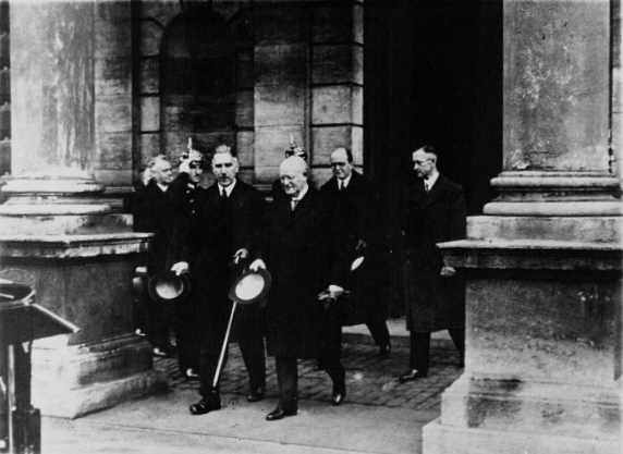 Von Papen y Held, saliendo de la estación de Múnich en 1932.